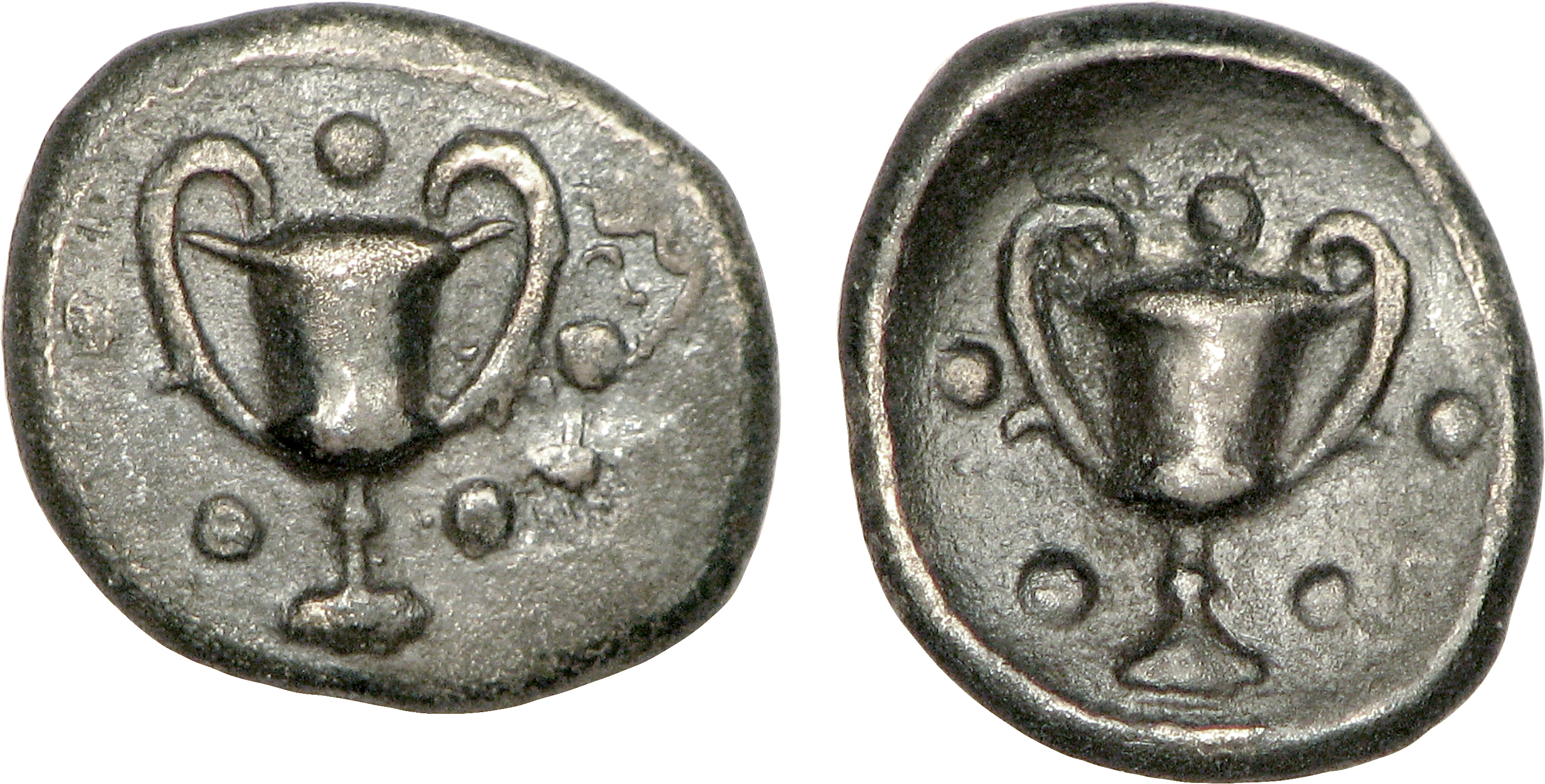 Nom de l'atelier : Calabre, Tarente Métal : argent Diamètre : 10,5mm Axe des coins : 9h. Poids : 0,55g. Titulature avers : Anépigraphe. Description avers : Canthare accosté de cinq globules, deux de chaque côté et un au-dessus. Titulature revers : Anépigraphe. Description revers : Canthare accosté de cinq globules, deux de chaque côté et un au-dessus.